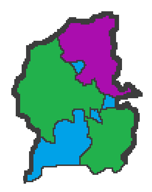 Alcaldes de la Comarca de O Condado